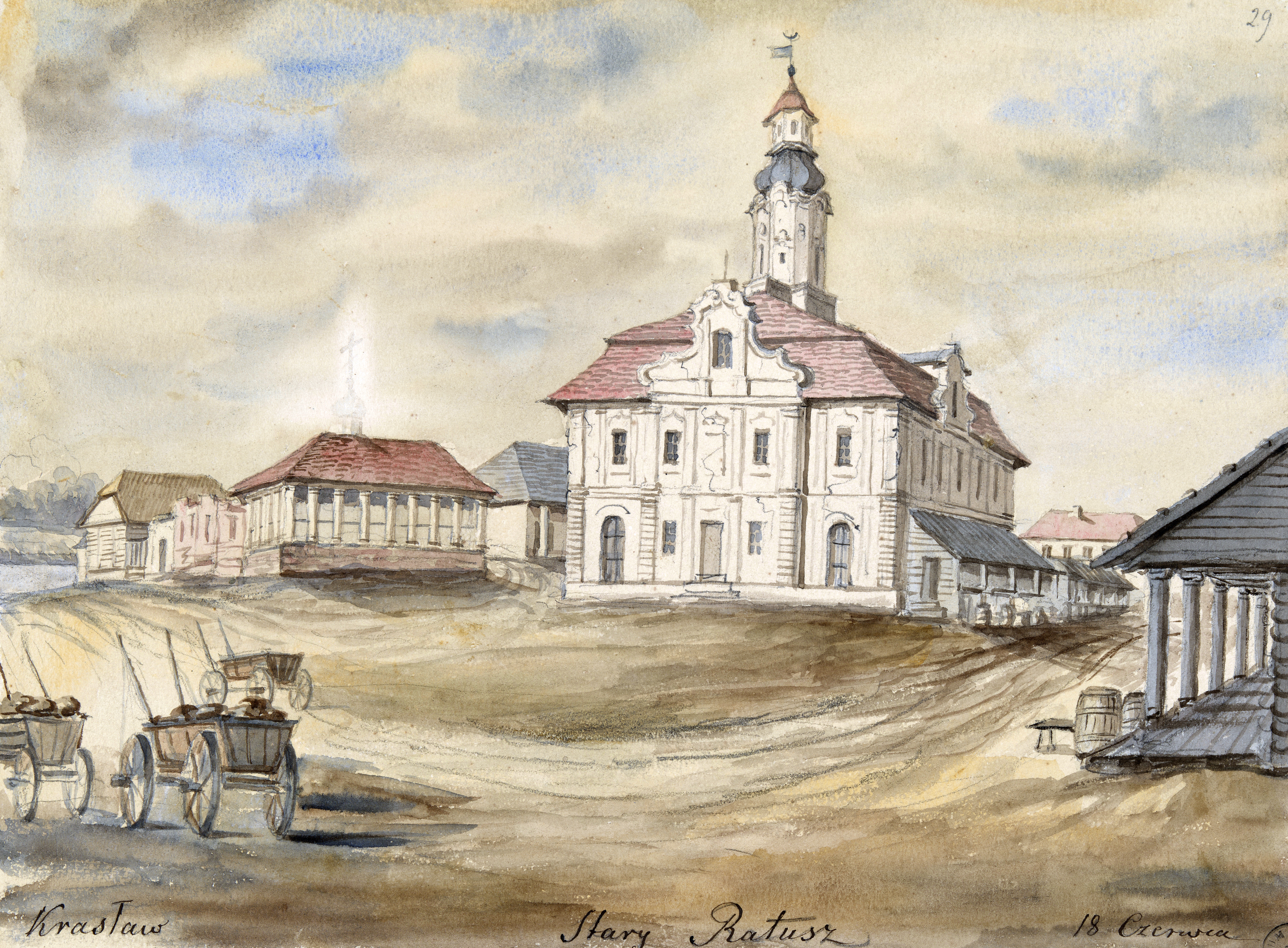 Беларуская (тарашкевіца): Краслаў (Krasłaŭ). Ратуша